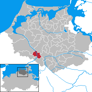 Bad Sülze in Mecklenburg-Vorpommern - District Nordvorpommern